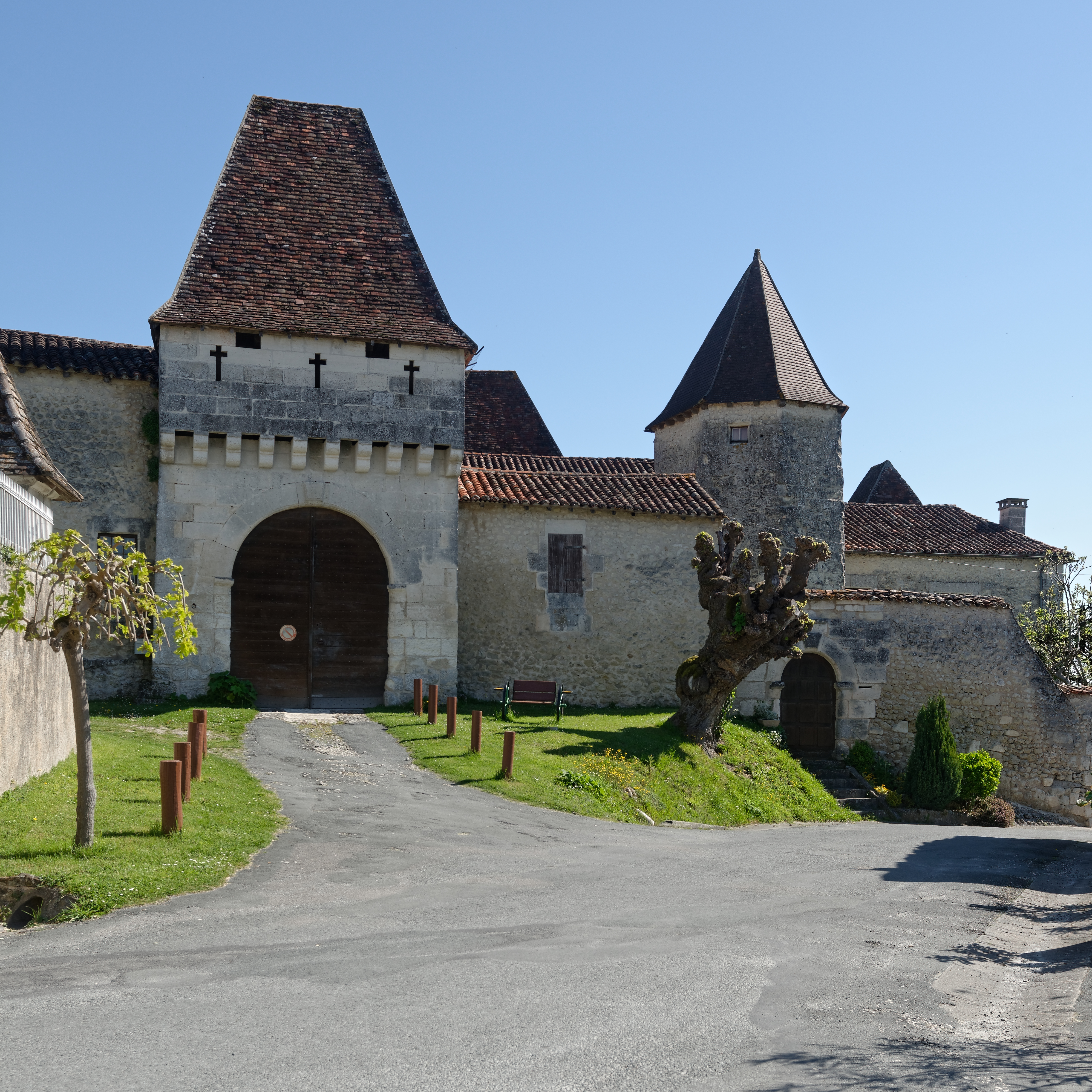 Château fort de Lusignac (Dordogne, France).